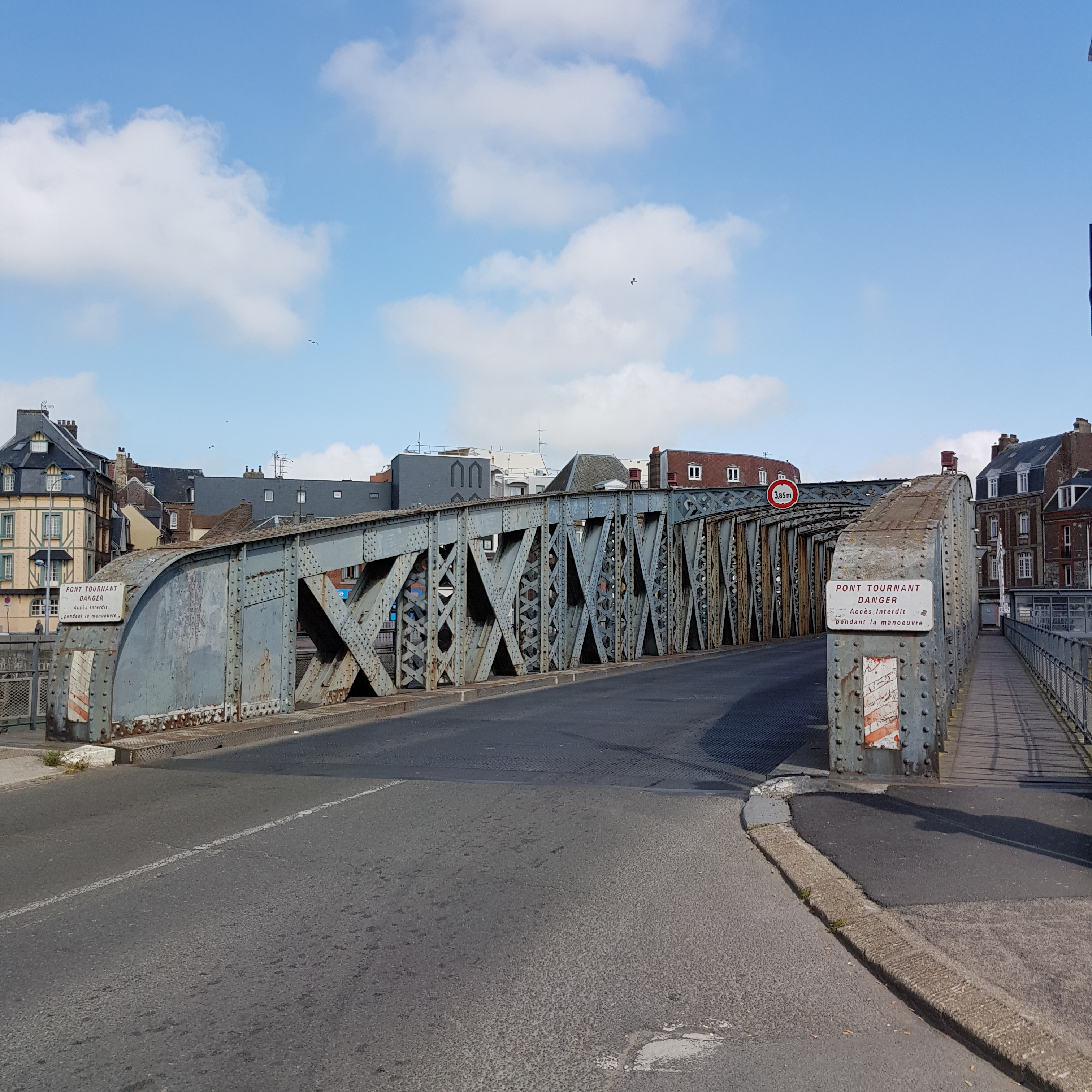 Entrée du pont Colbert, côté île du Pollet, à Dieppe (Seine-Maritime) en avril 2017.